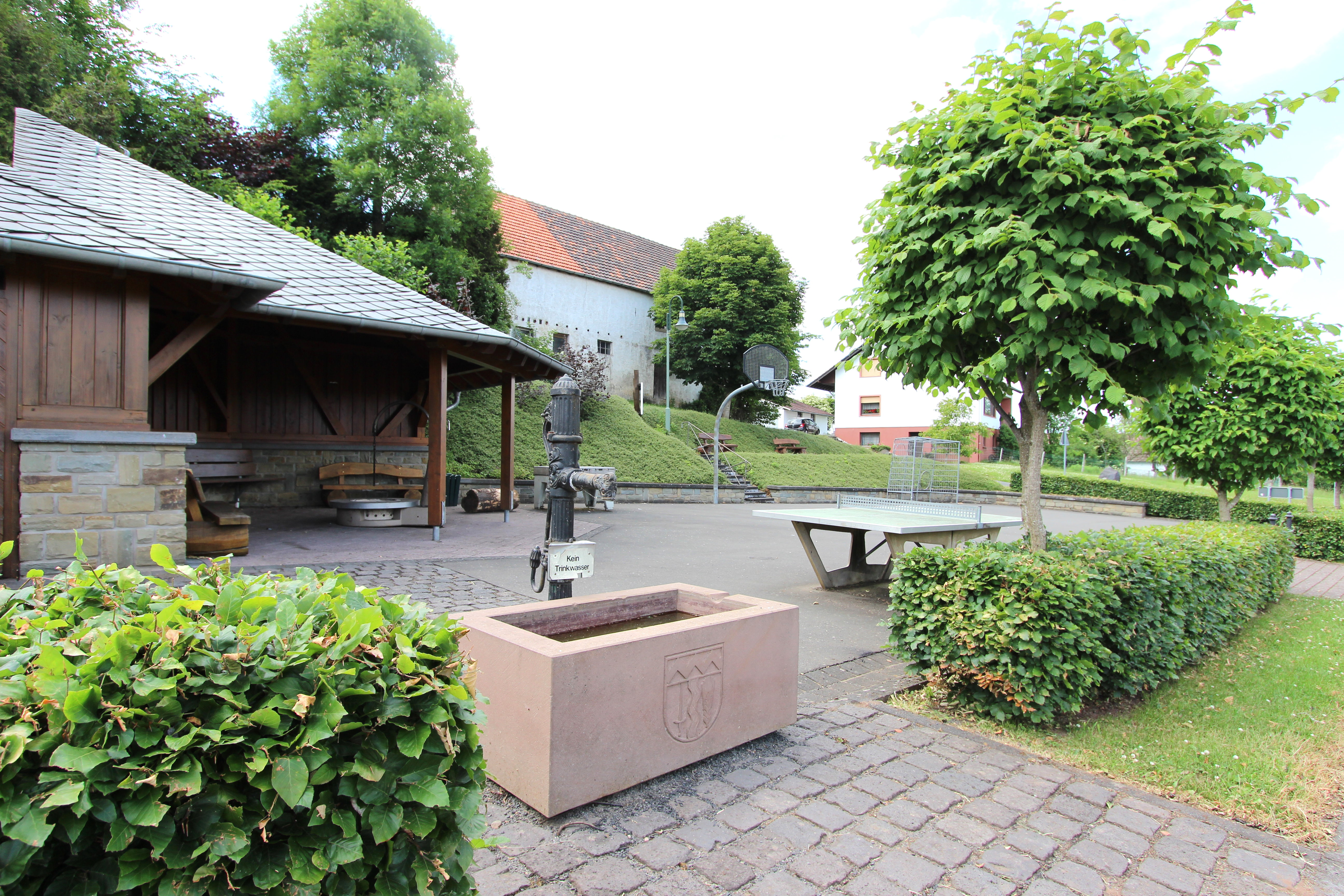 54589 Kerschenbach, an der Ormonter Straße und Dorfstraße. Gemeinschaftsplatz mit Grill, Brunnen und diversen Freizeitmöglichkeiten. Aufnahme von 2017.